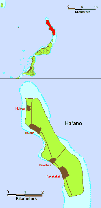 Lea faka-Tonga: no original description